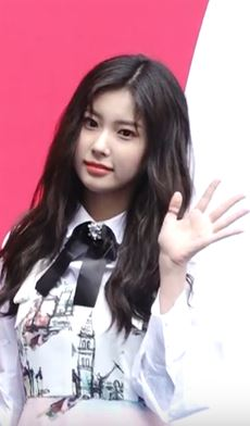 그룹 '아이즈원(혜원, 히토미, 채원)'이 20일 오후 서울 중구 동대문디자인플라자(DDP)에서 열린 '2019F/W 서울패션위크' 빅팍 컬렉션에 참석했다.